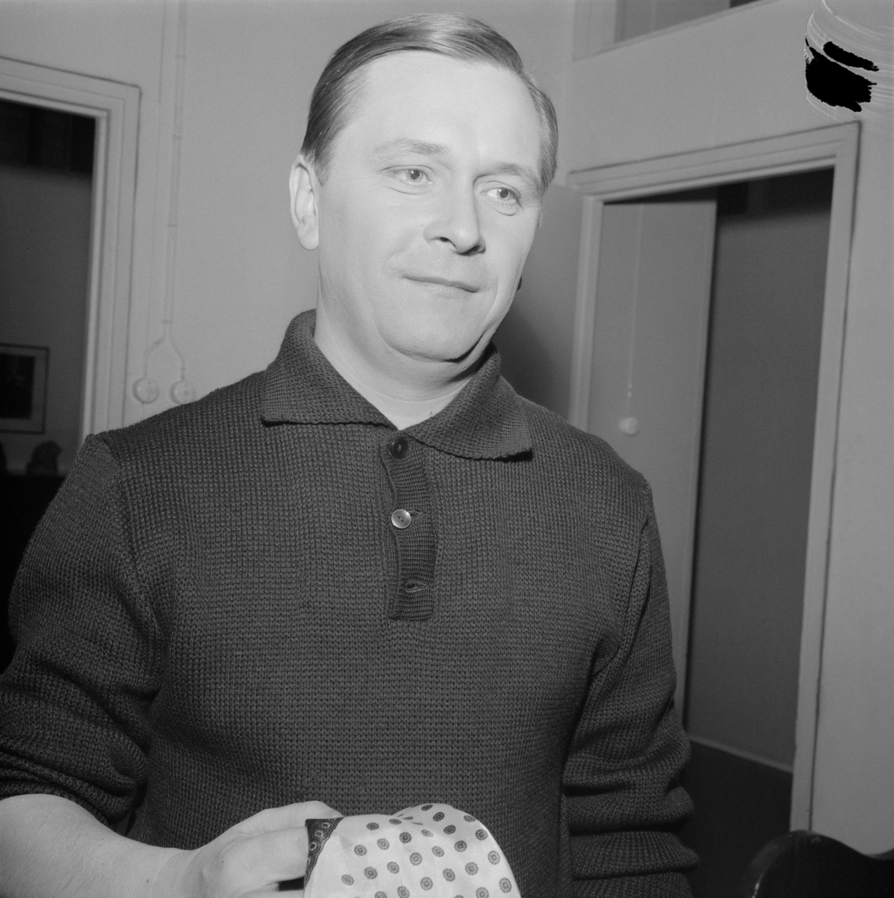 Näyttelijä Leo Jokela. Helsinki 19.4.1961.